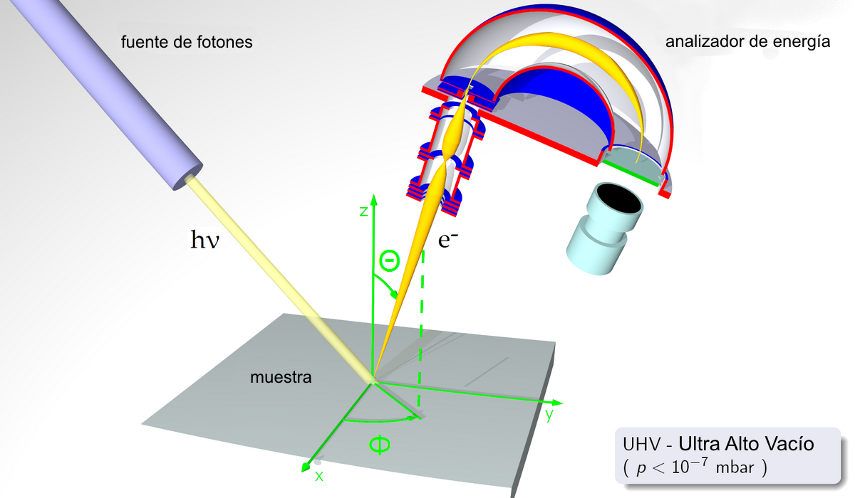 Principio general de la espectroscopia de fotoemisión de ángulo resuelto (ARPES).